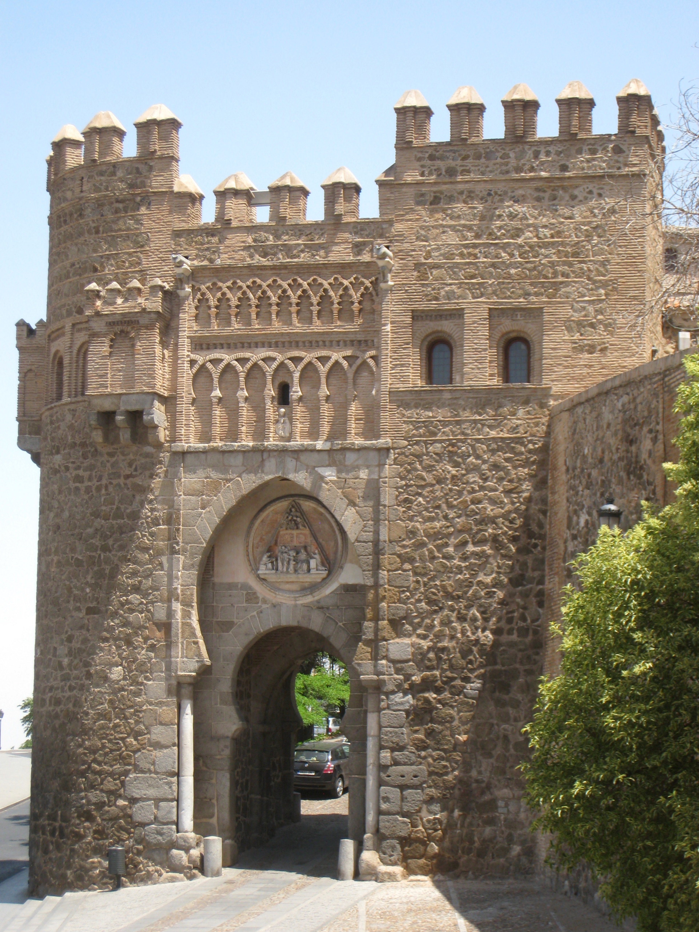 Puerta del Sol, Toledo, Spain.